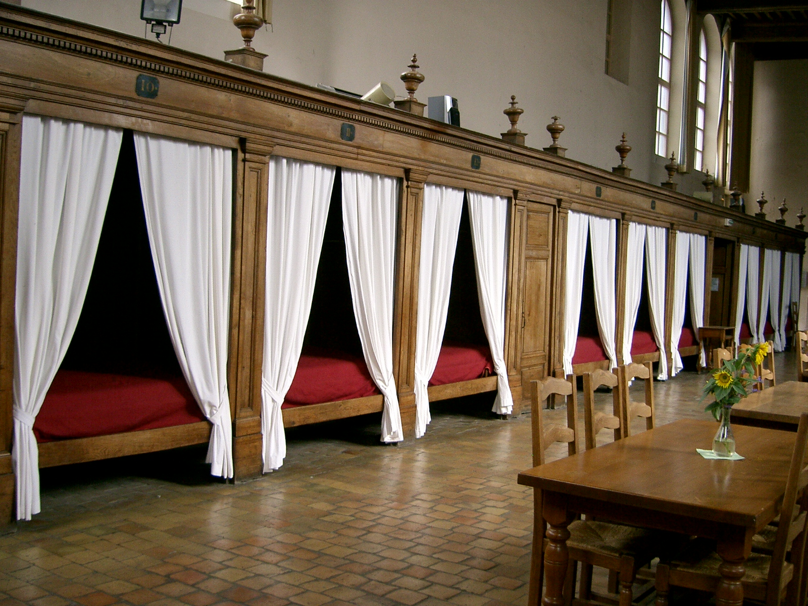 Hospices de Seurre (17e siècle) - ancienne salle des malades France (21 - Bourgogne) self made PRA